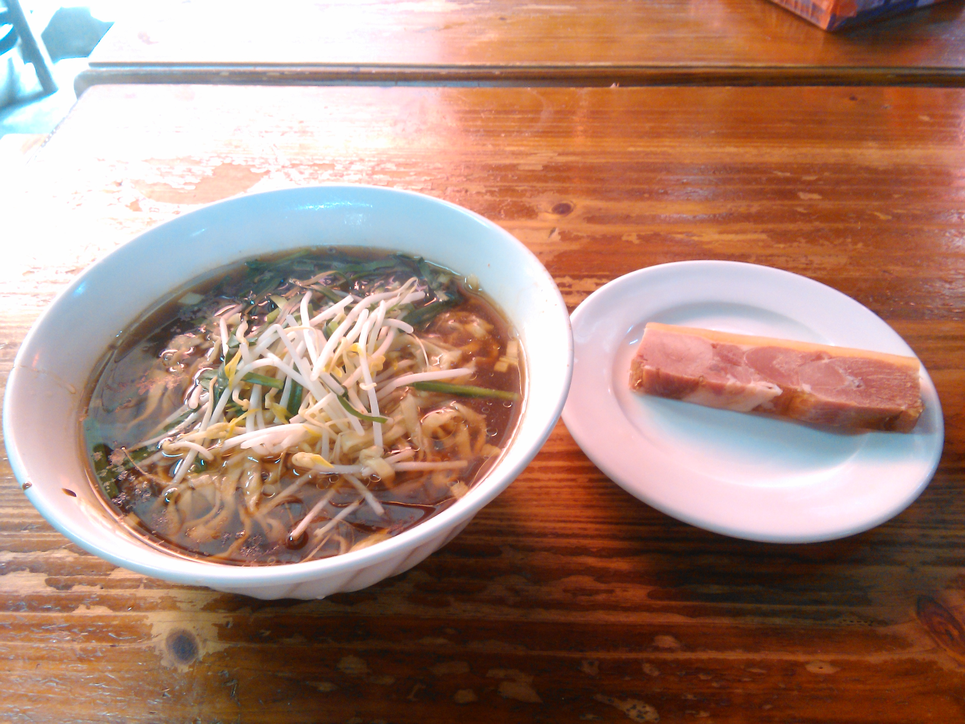 中文（中国大陆）: 三怪锅盖面。摄于西津渡李嫂锅盖面。左为锅盖面，右为肴肉